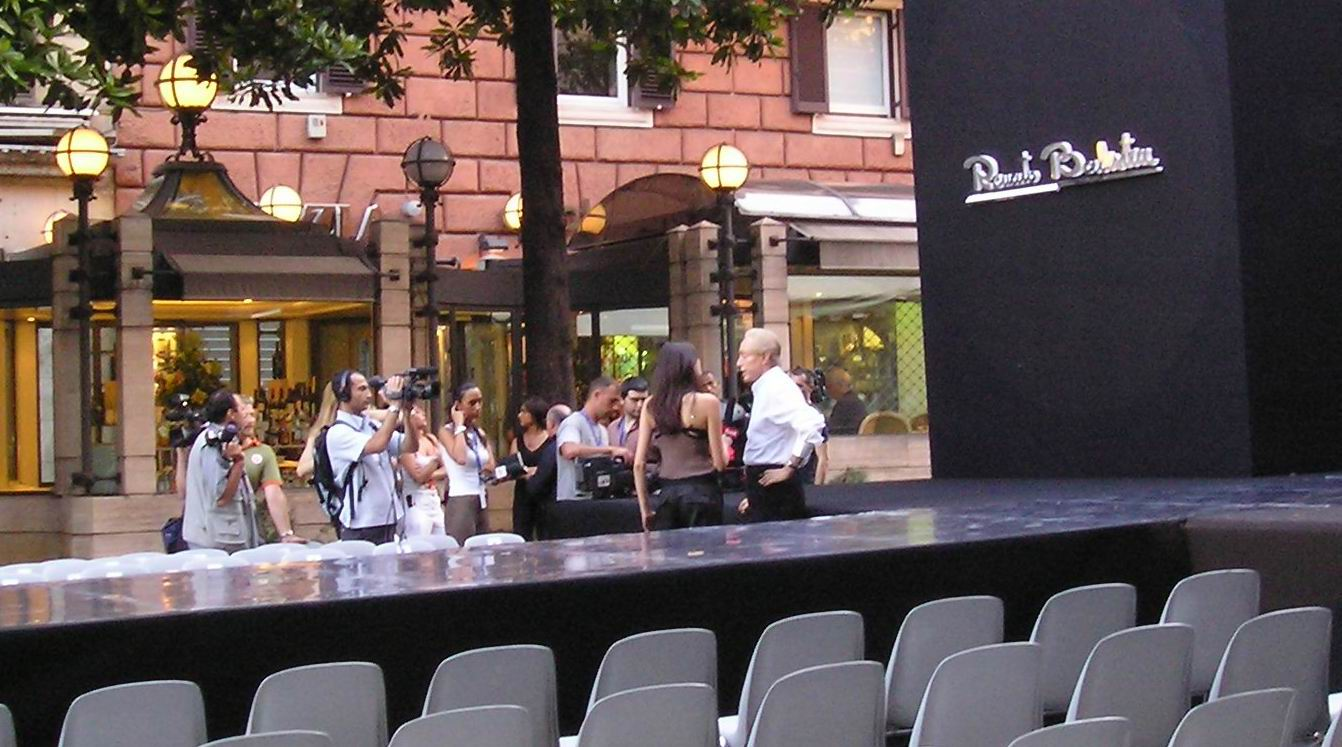 Préparatifs du défilé de Renato Balestra, via Veneto en juillet 2004